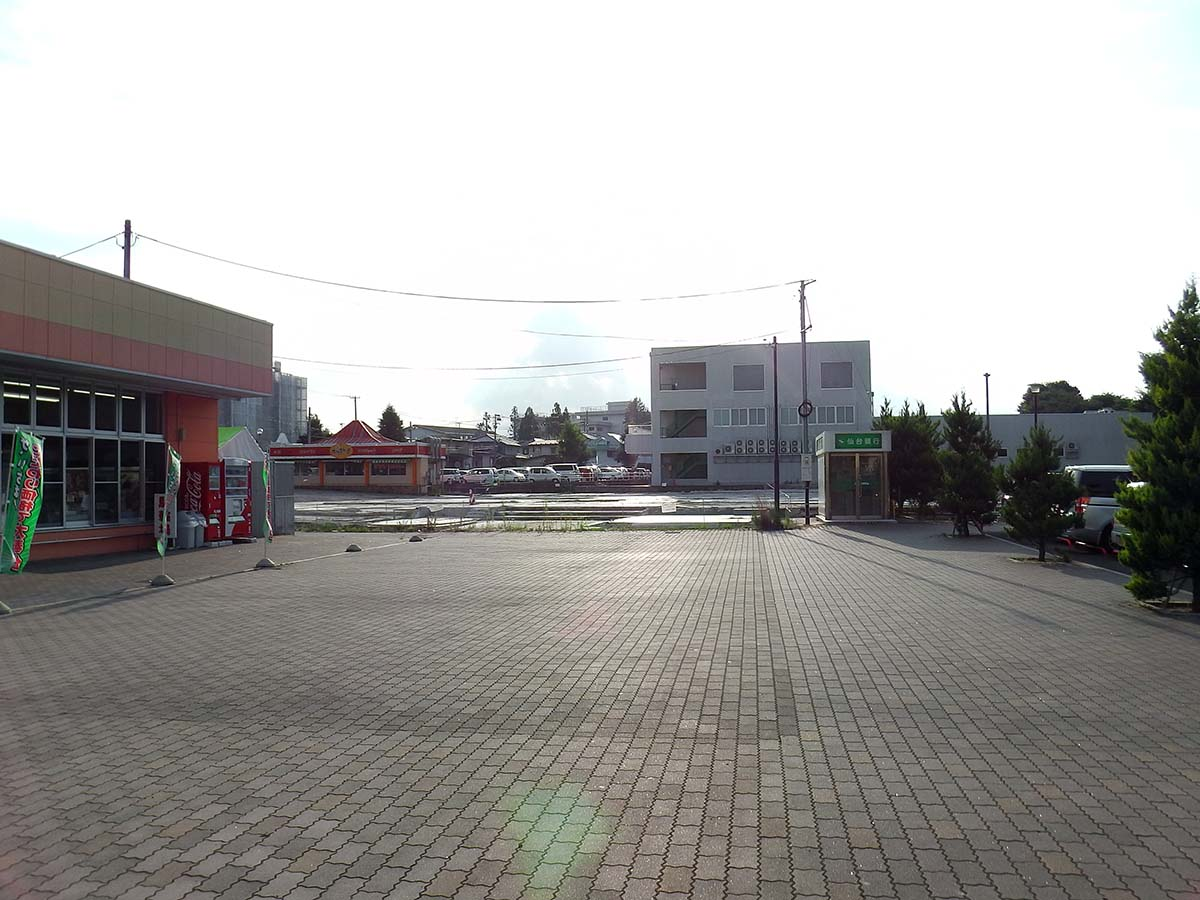 仙台市宮城野区鶴ケ谷ショッピングセンター付近にて撮影